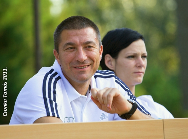 Konkoly Csaba, a Győri Audi ETO KC (2007–2011), majd a Fehérvár KC vezetőedzője (2012–).